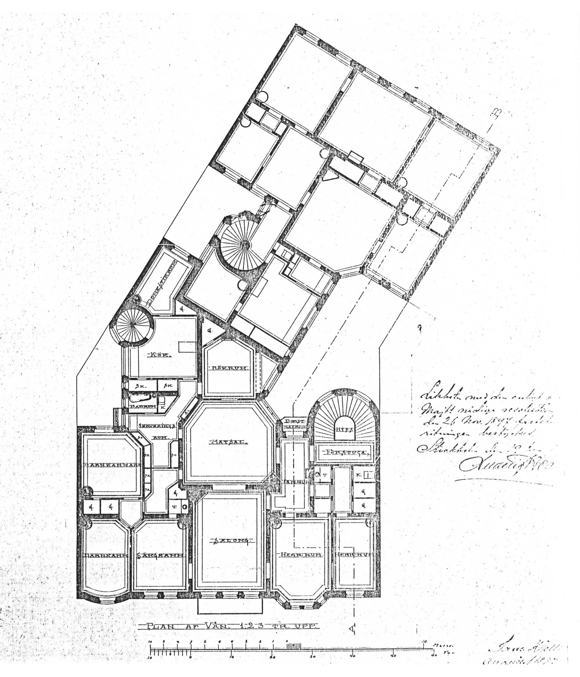 Birger Jarlsgatan 24, planritning 1-3 tr.